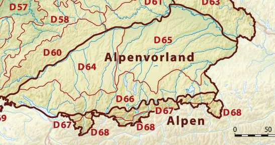 Haupteinheitengruppen des Alpenvorlandes und der deutschen Alpen